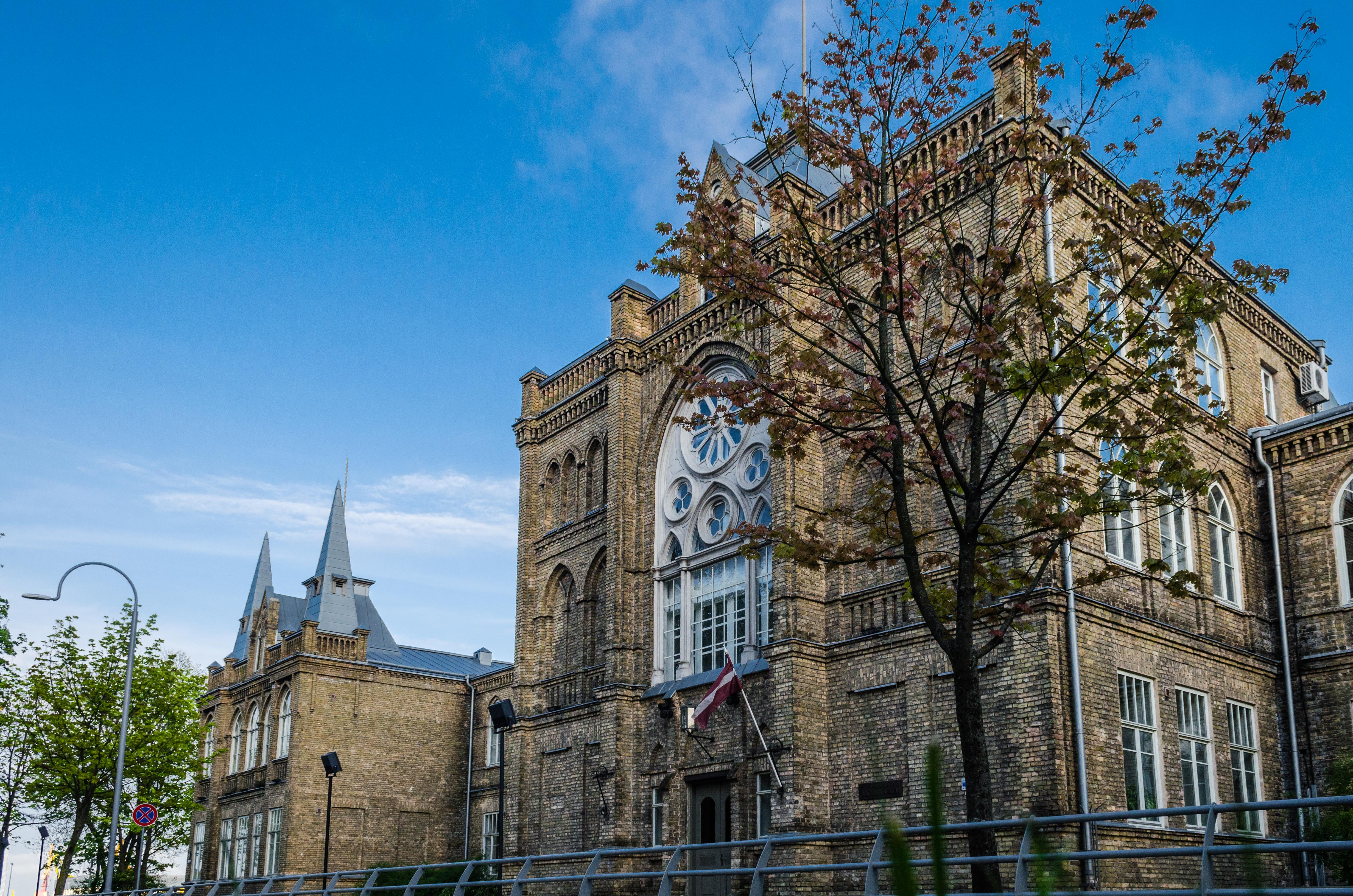 Ventspils ģimnāzija, Ventspils, Kuldīgas iela 1